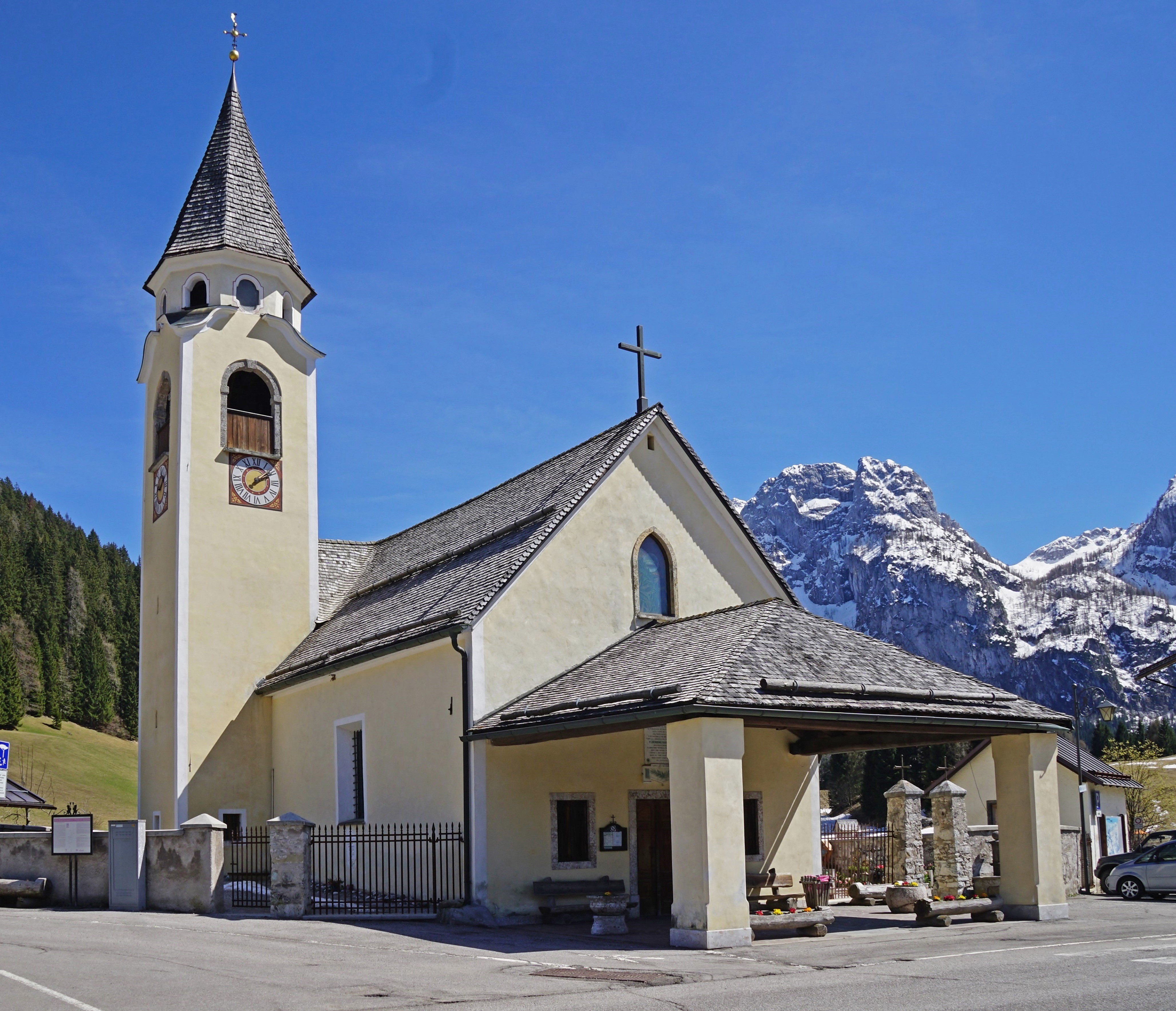 Die Kirche St. Oswald in Cima Sappada (Sappada, Italien)